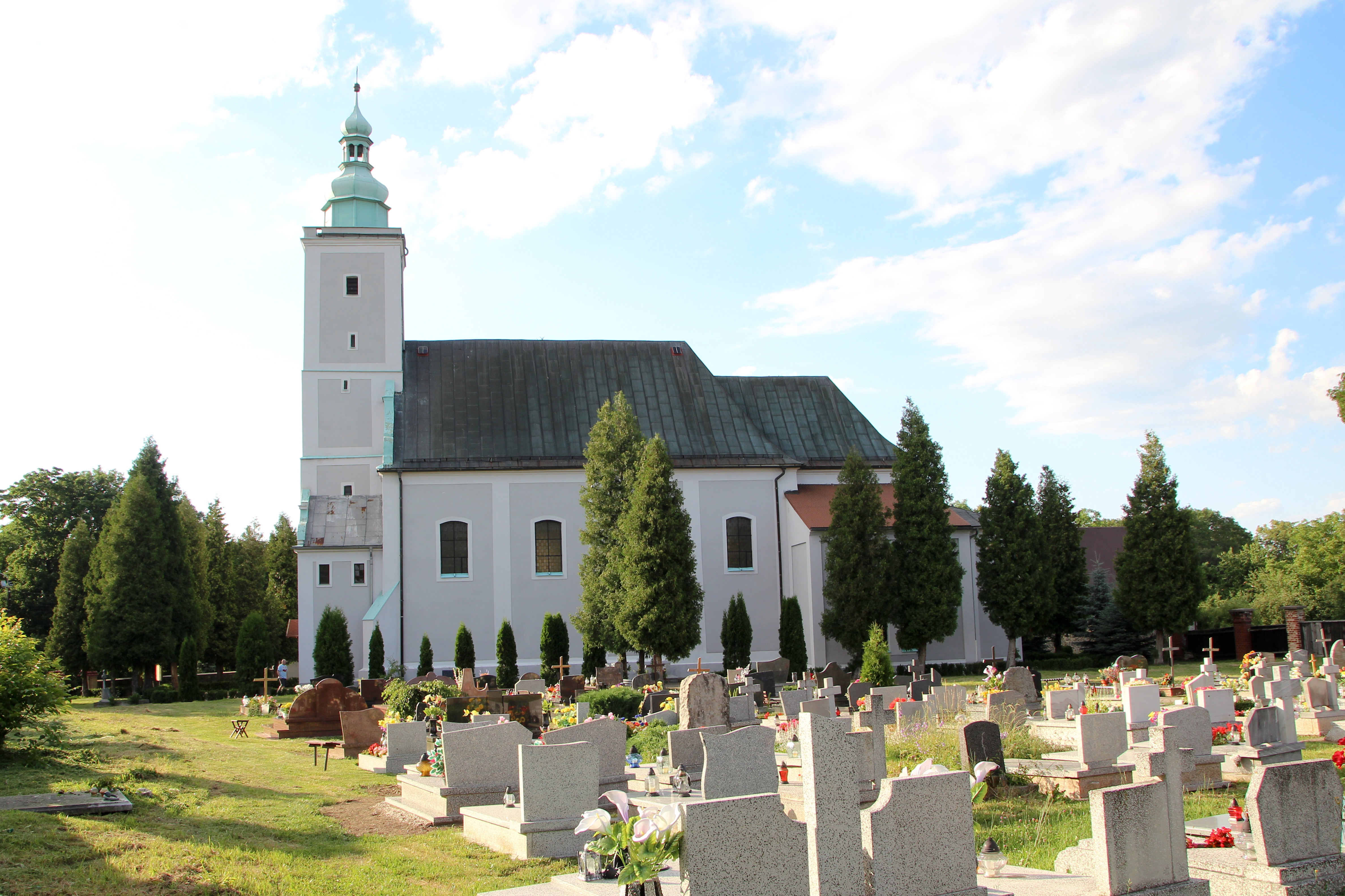 Trzebina - rzymskokatolicki kościół parafialny p.w. Wniebowzięcia NMP, XV, XVII, 1726